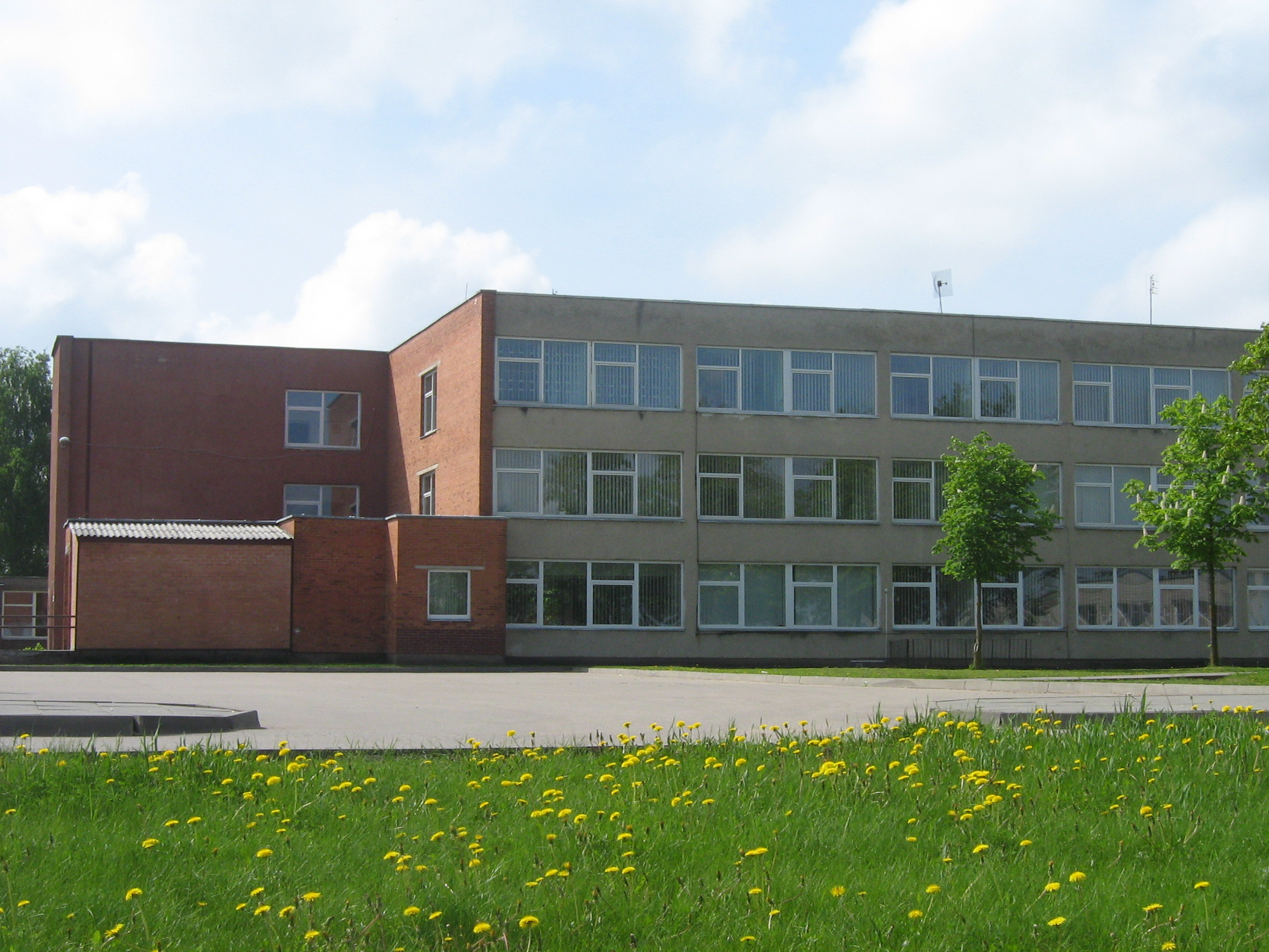 Jonavos poliklinikos dešinioji pusė